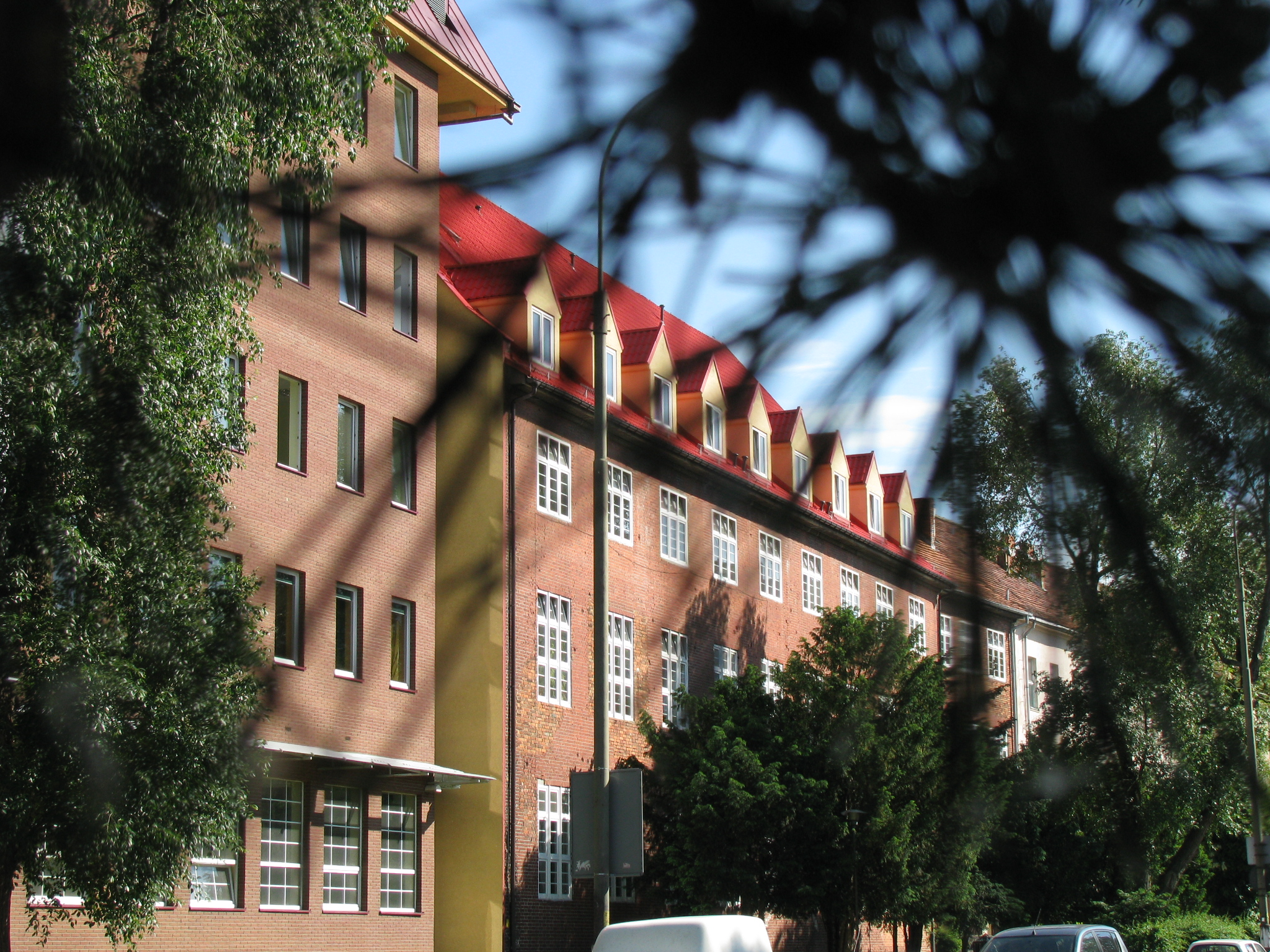 Uniwersytet Ekonomiczny we Wrocławiu